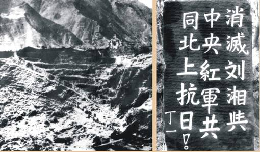 1935年6月中，红一方面军与红四方面军在四川西部的憋地区胜利会师。左图为会师地憋功。右图为红四方面军在长征路上刻在石碑上的标语。